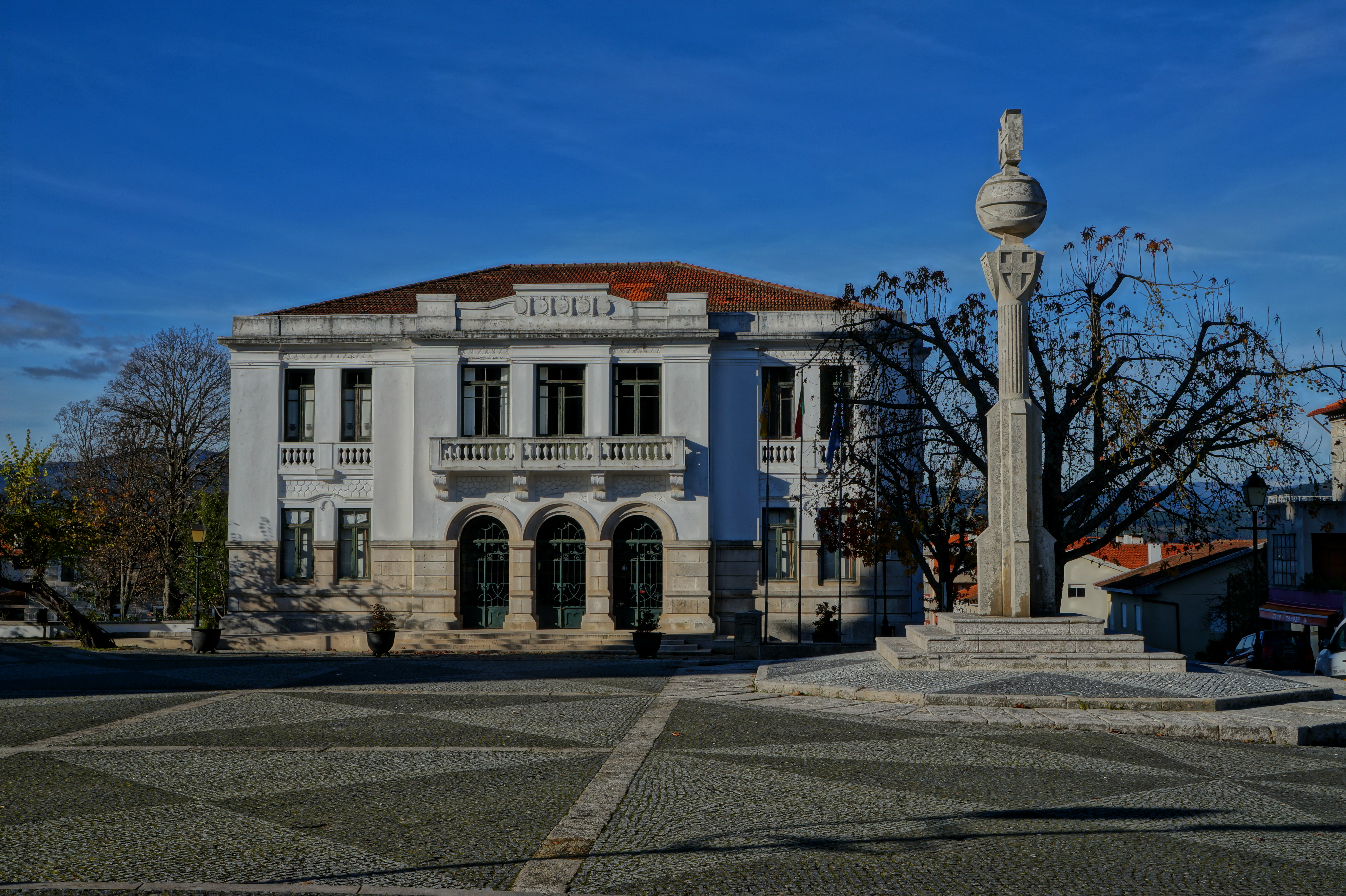 Paços do Concelho